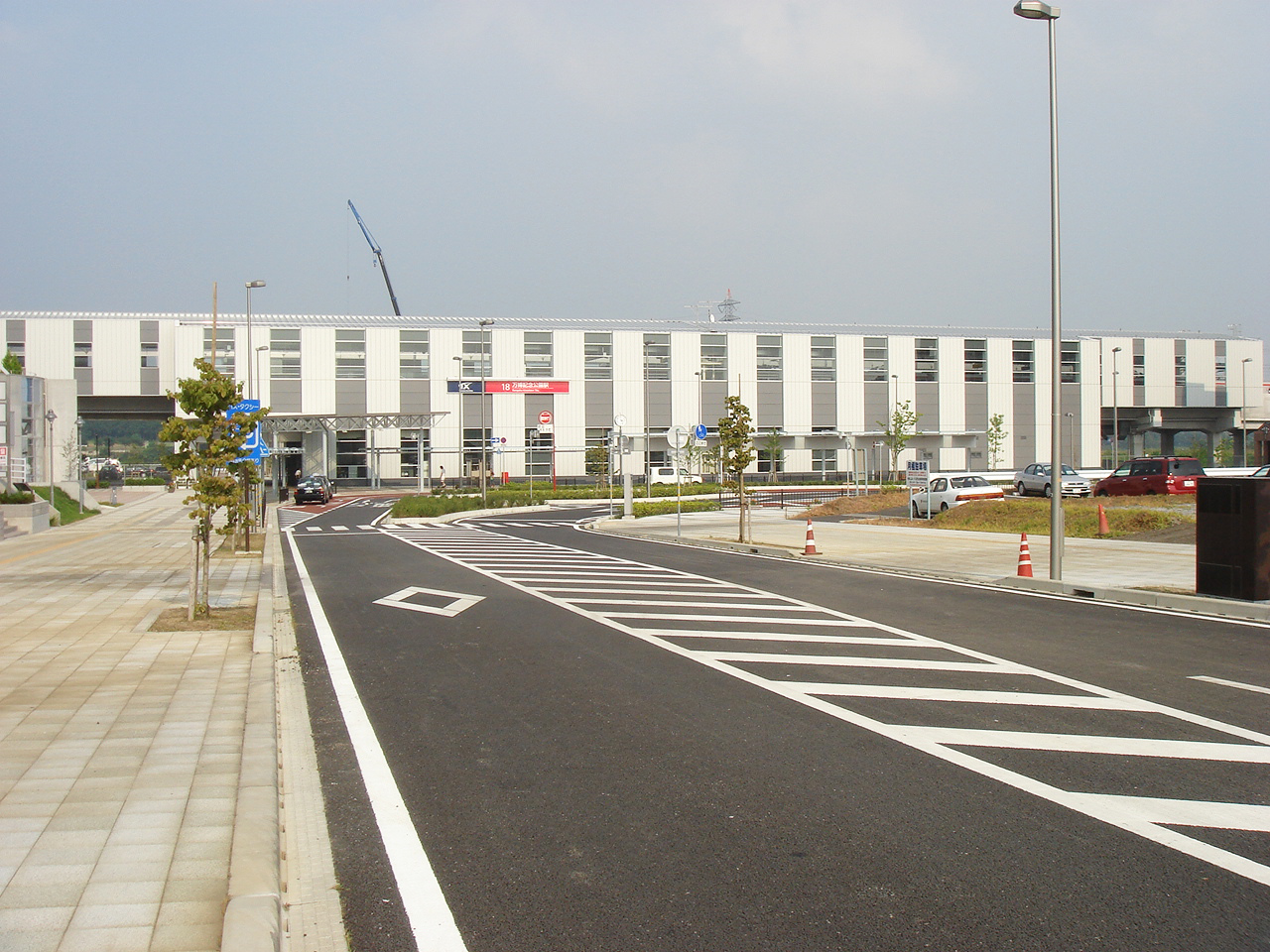 つくばエクスプレス万博記念公園駅